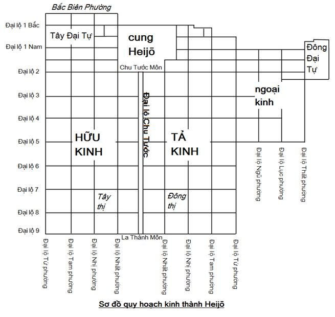 Sơ đồ quy hoạch kinh thành Heijō theo chế độ Điều phường chế. Dịch từ bản tiếng Nhật. (sửa tên)